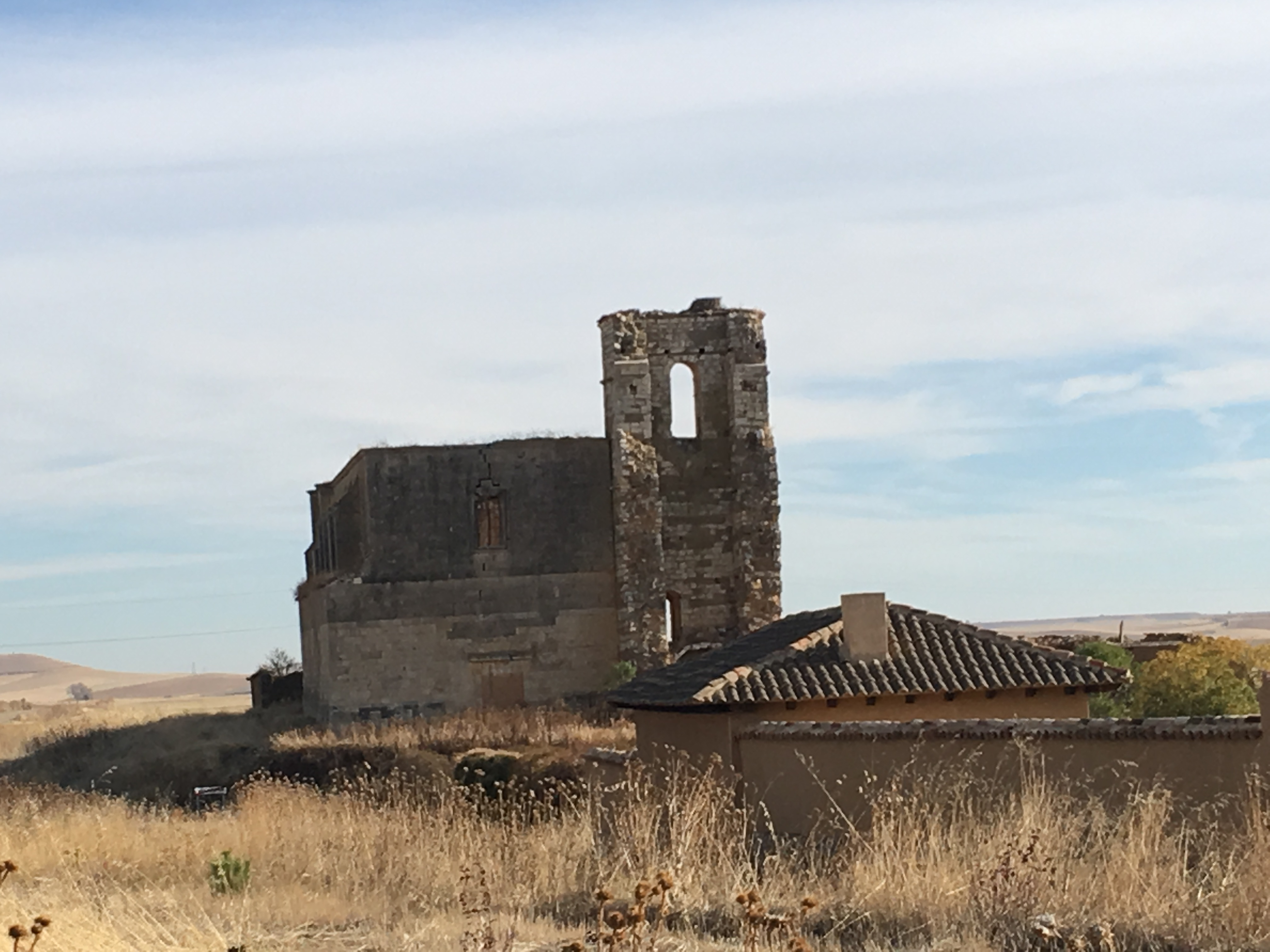 Villaesper Milenario